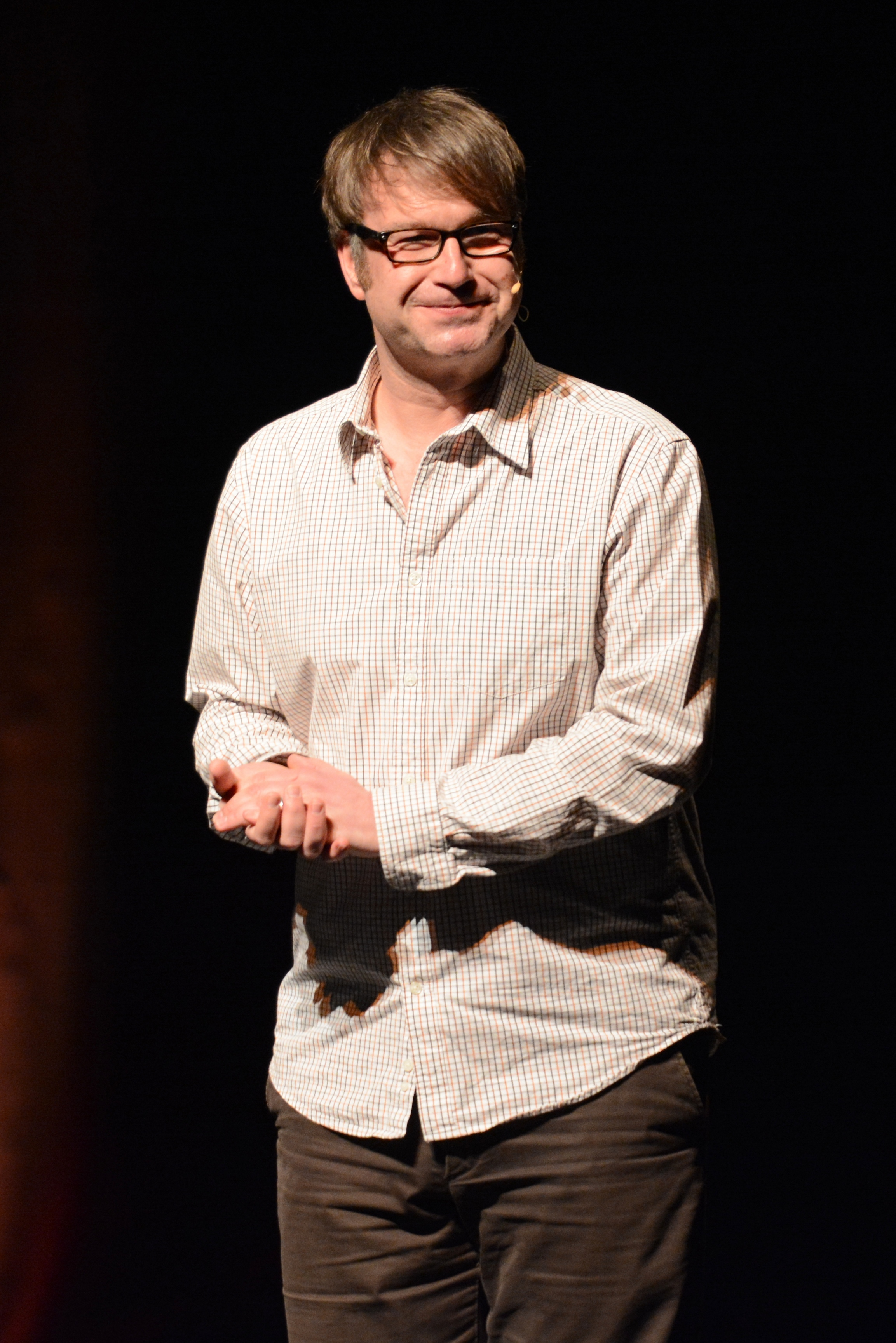 Volker Weininger bei einer Vorrundenvorstellung von Das Schwarze Schaf 2014 in Wesel.